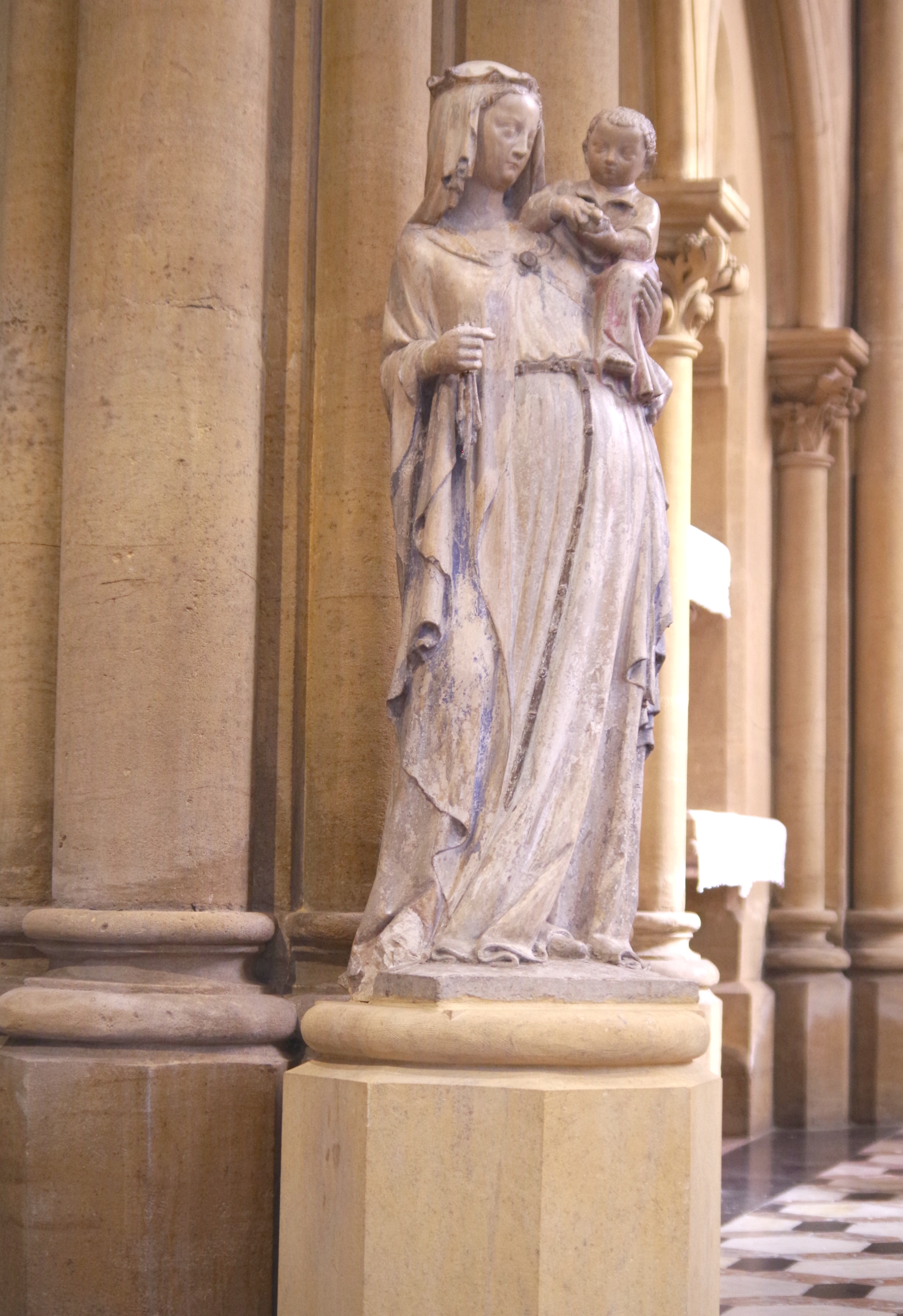 Vierge à l'Enfant, Chapelle de la Providence, Peltre. Monument historique PM57000266